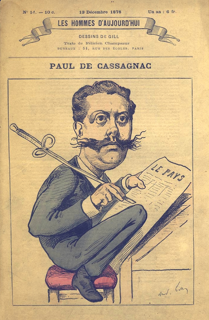 Paul de Cassagnac (1842-1904), caricature par André Gill, Les Hommes d'aujourd'hui, n°14, 13 décembre 1878